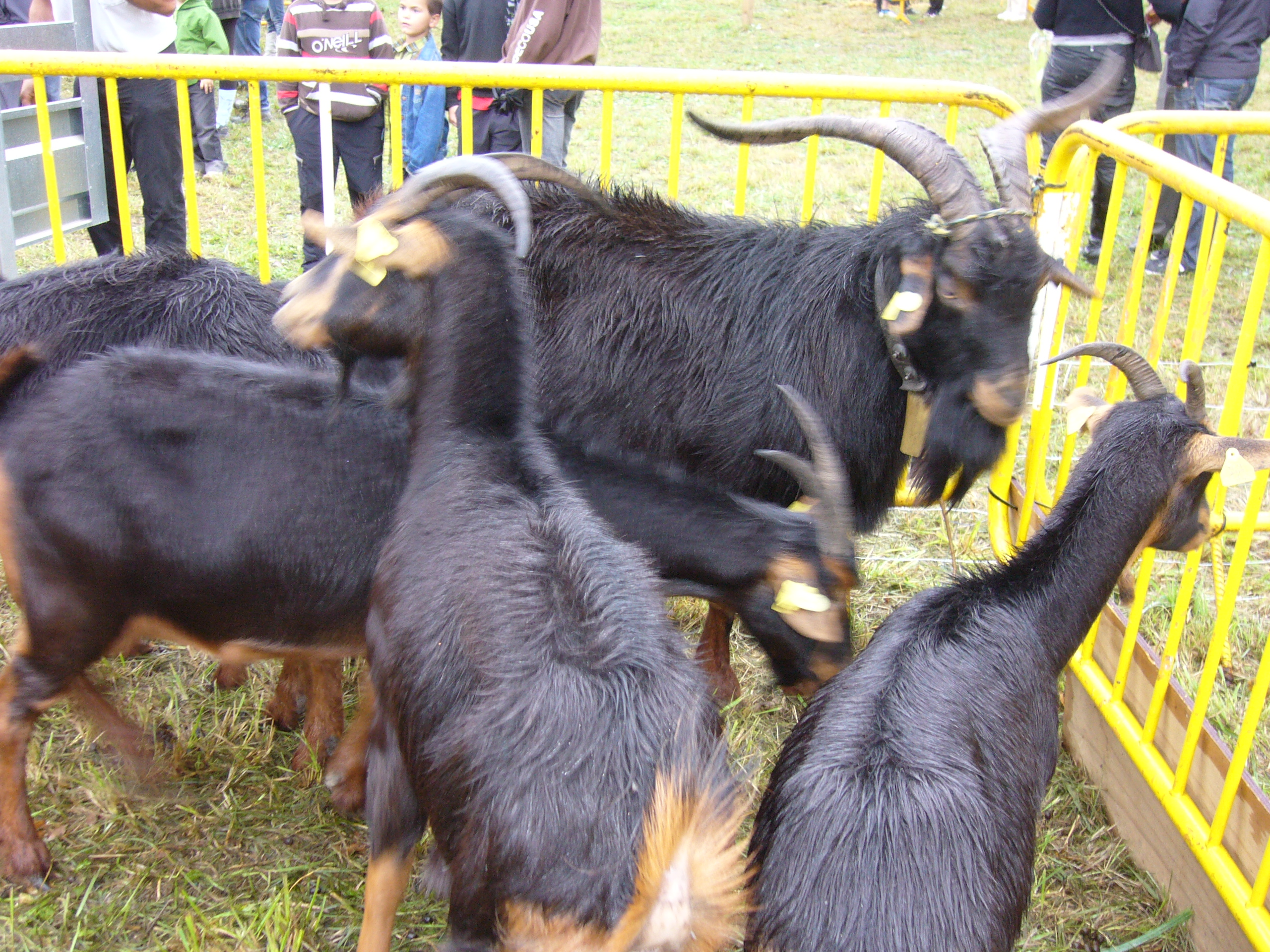 Ahuntz azpigorriak Ormaiztegiko azokan